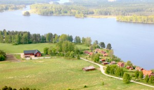 På Östahalvön där Biosfärum Gröna kunskapshuset ligger är det alltid nära till Dalälven. Landskapet bjuder bland annat på fina tallskogar, långa sandstränder och intressanta mossar.